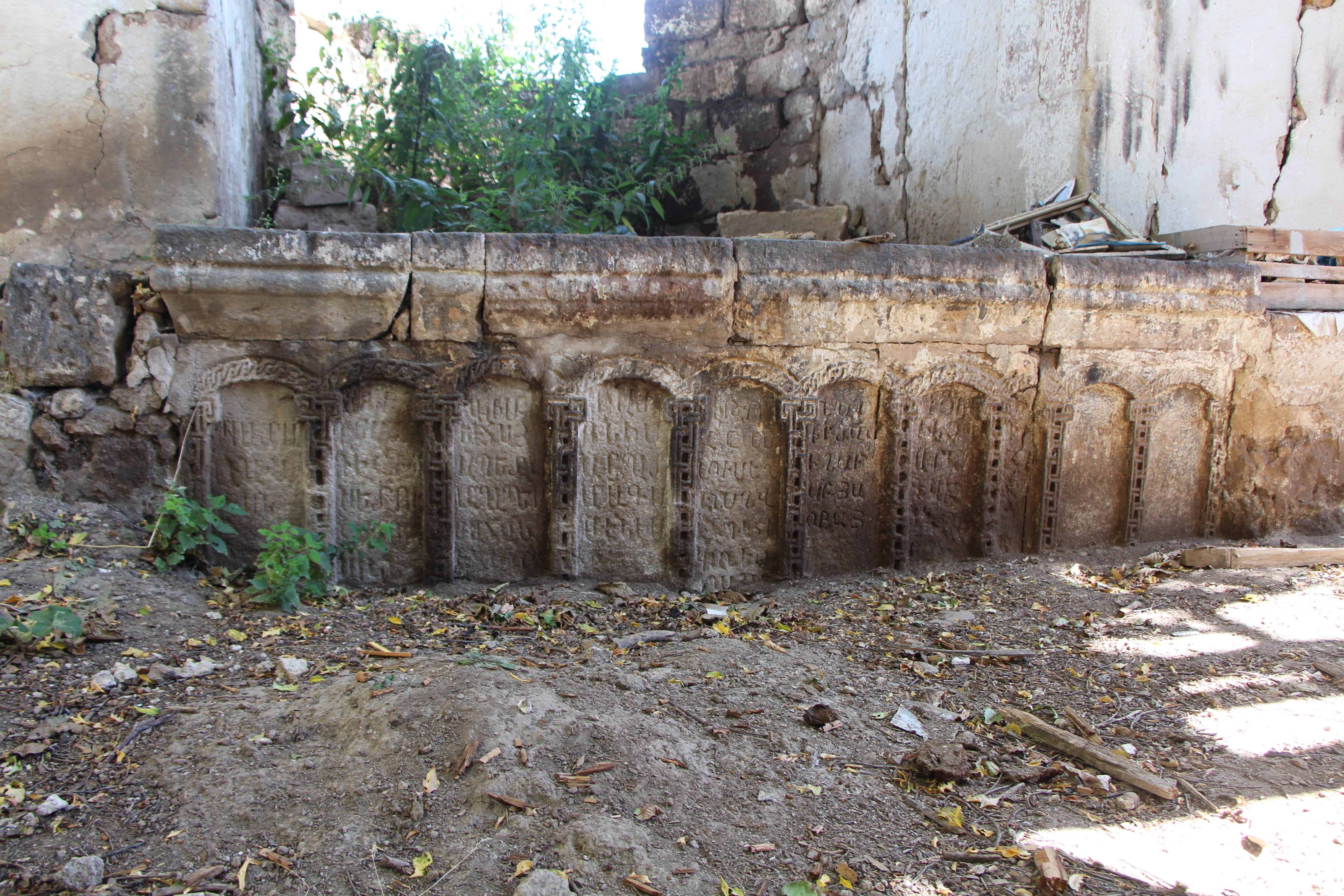 Անտառուտ, Արագածոտնի մարզ, ԵԿԵՂԵՑԻ Ս. ԱՍՏՎԱԾԱԾԻՆ 19 դ. q.մ. 2.10/2 կիսավեր 10/2